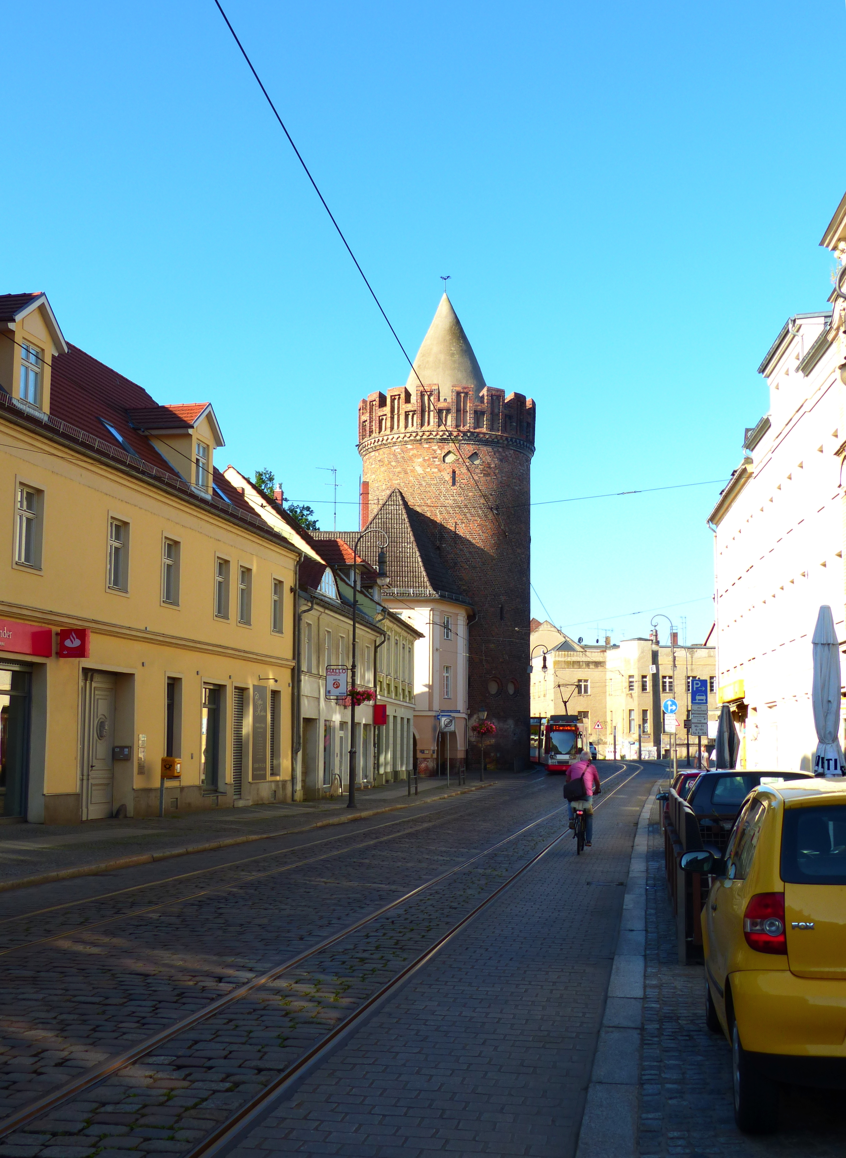 Brandenburg an der Havel: Steintorturm und Steinstraße, Fahrbahn mit fahrradfreundlikch besserem Pflaster seitlich der Straßenbahngleise